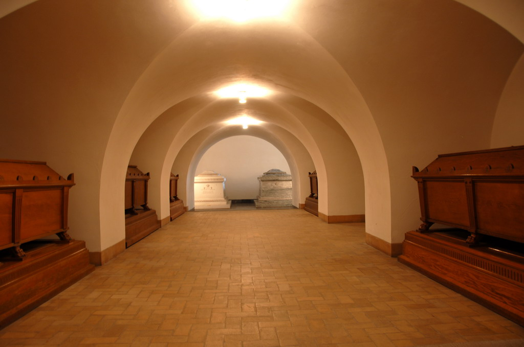 Sarcofagen onder de grond. Ik vermoed dat de Oranje tombes in de Grote Kerk van Delft ook op deze manier zijn neergezet.